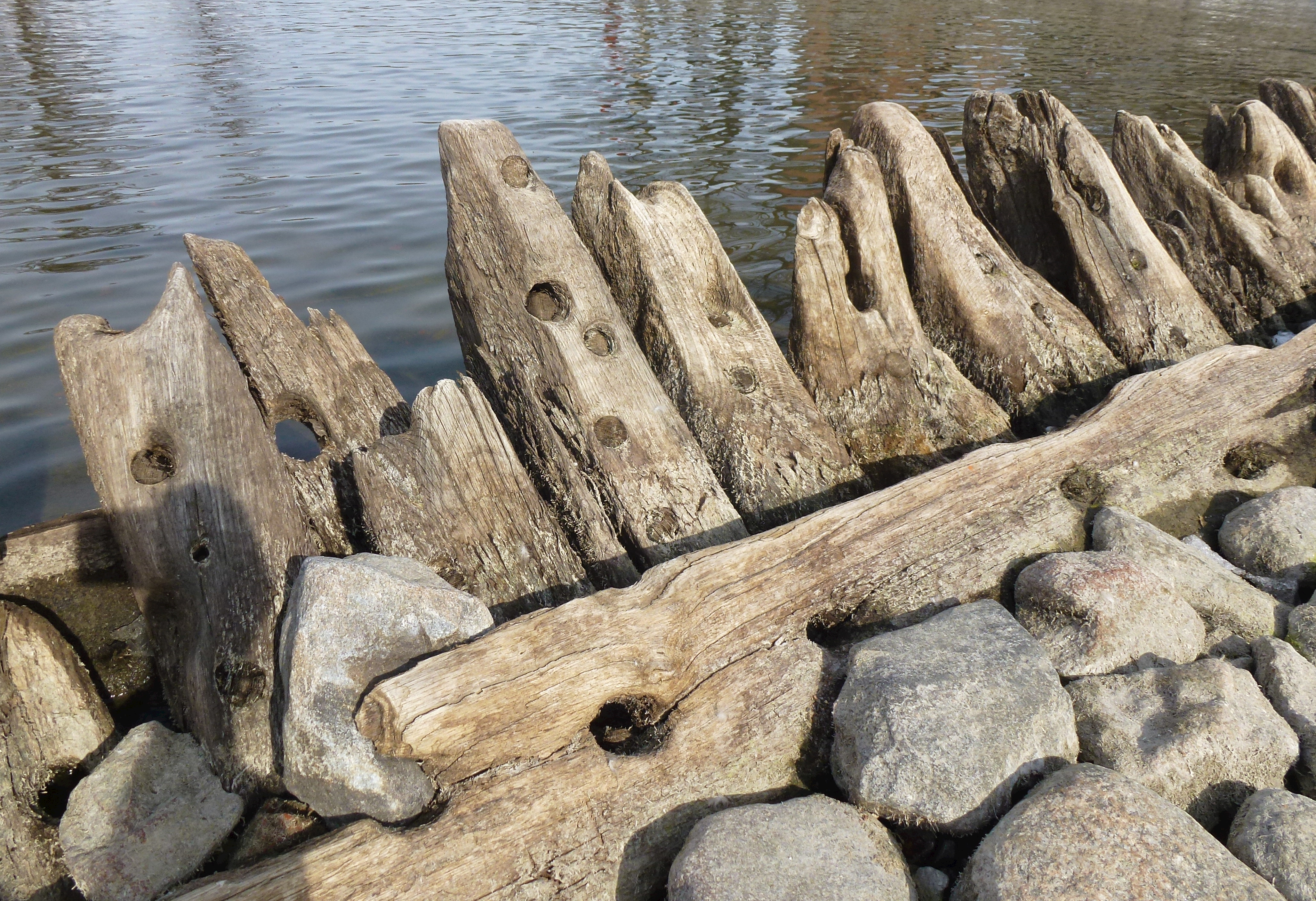 Kastellholmen vrak efter örlogsfartyg från 1600-talet